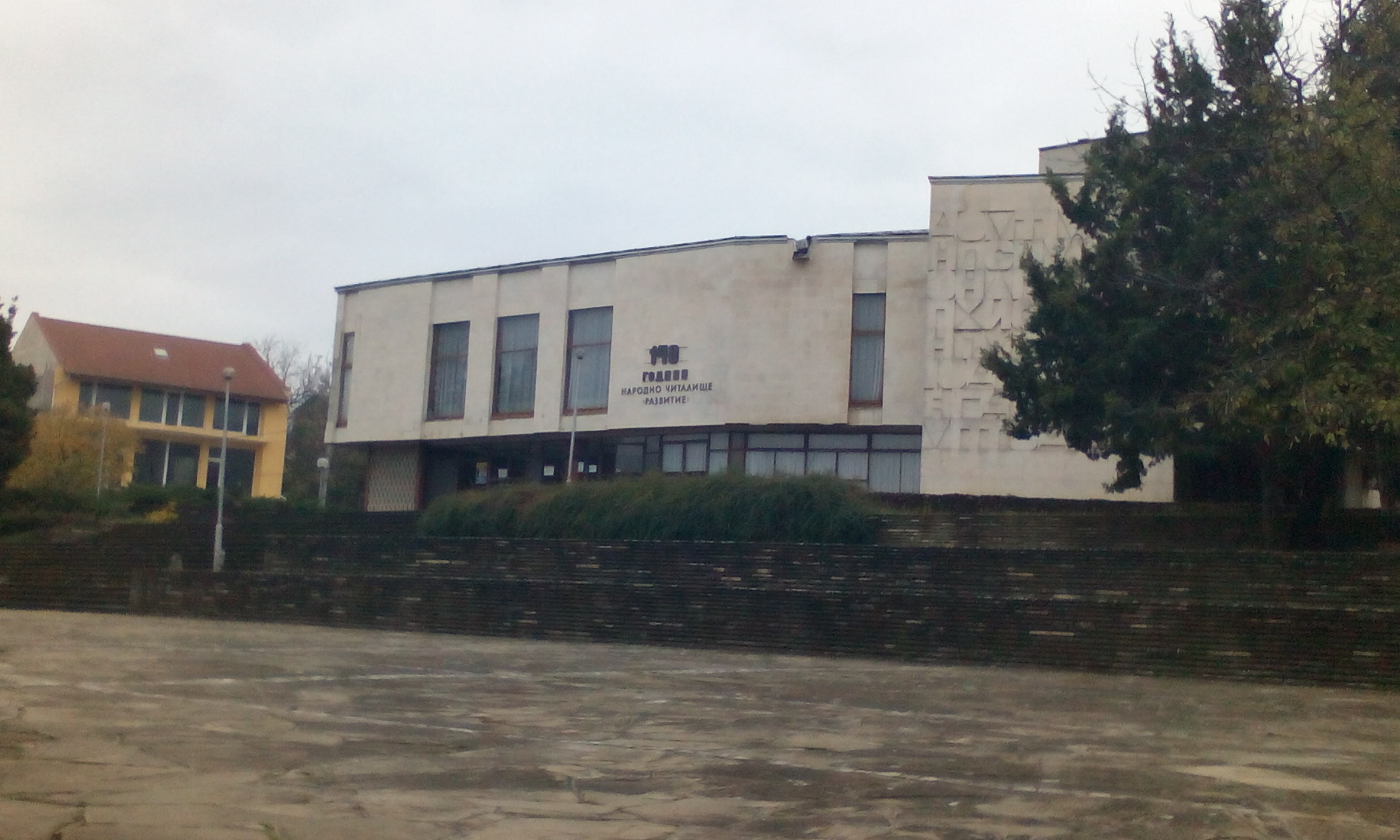 Читалище Развитие във Велики Преслав